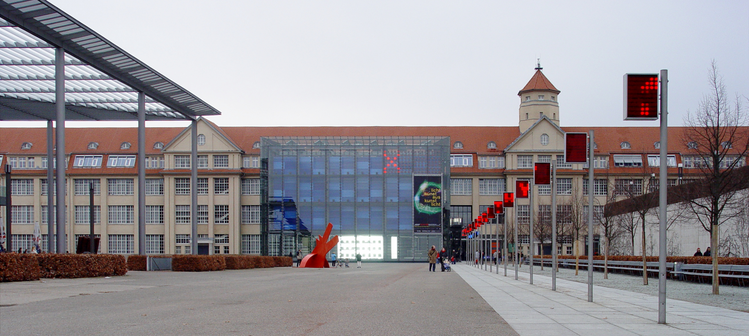 ZKM Zentrum für Kunst und Medientechnologie, Karlsruhe Fotografiert von Martin Dürrschnabel Datum 19.02.2006 Kamera: Sony DSC F717